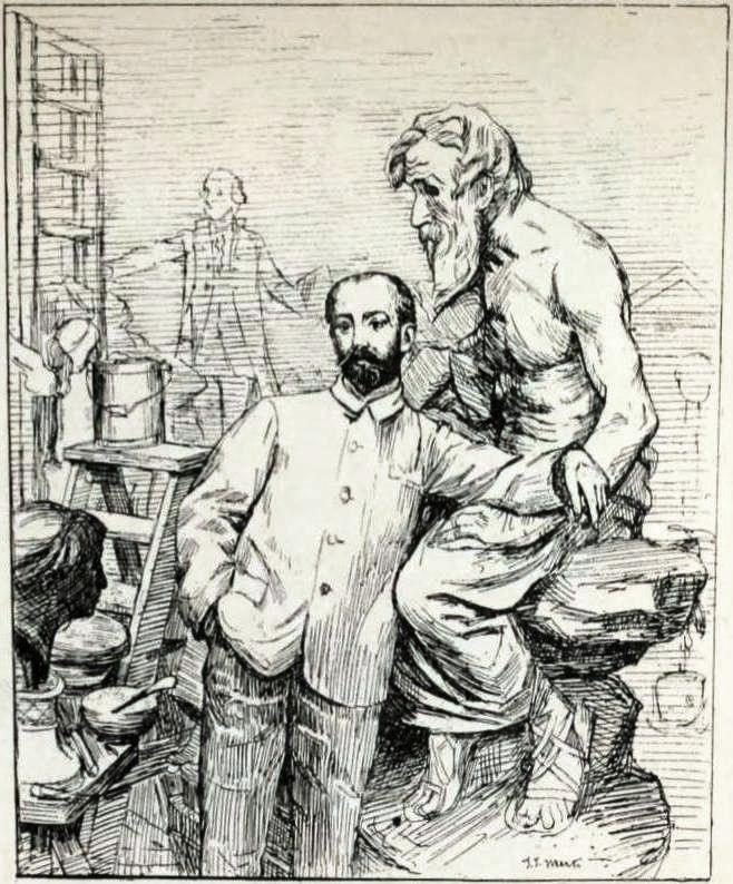 "Portrait de M. J[ean-Baptiste] Hugues" [s'appuyant sur son groupe Œdipe à Colone].